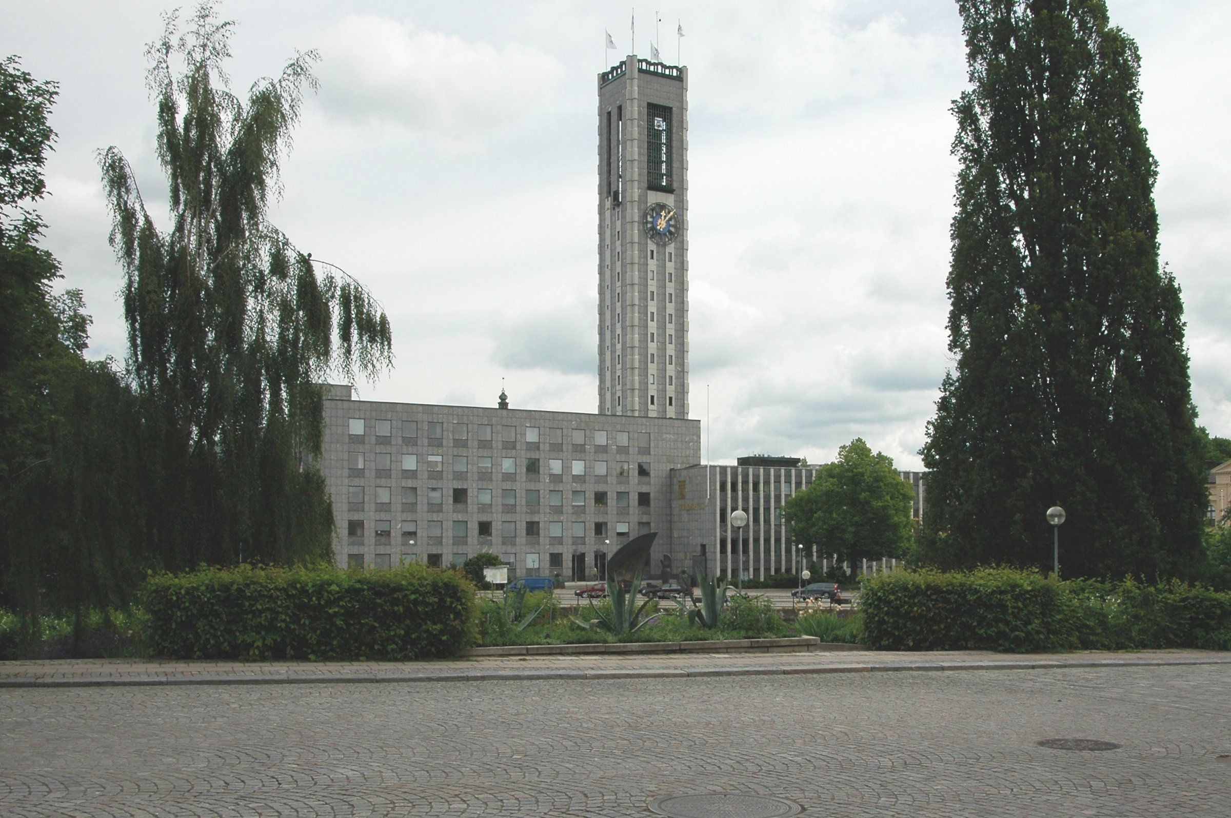 Västerås stadshus, Västerås